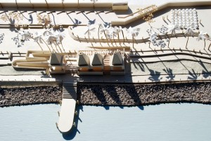 Esboso de lo que hoy es el paseo del rio balsas, el malecon de la cultura y las artes en Lázaro Cárdenas Michoacán.